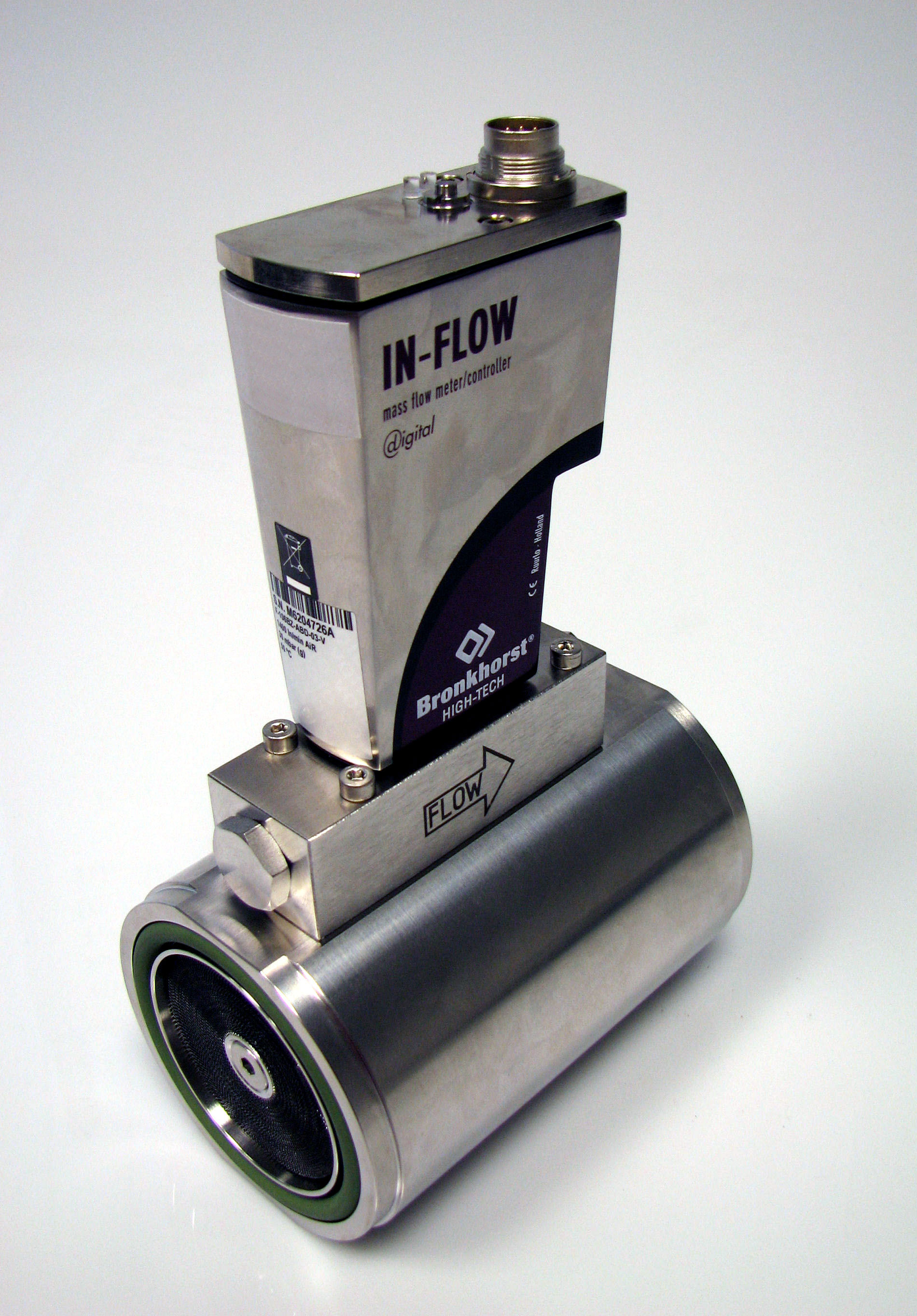 Luftmassenmesser kalibriert für max. 1400 nl/min Mass flow meter for max 1400 nl/min